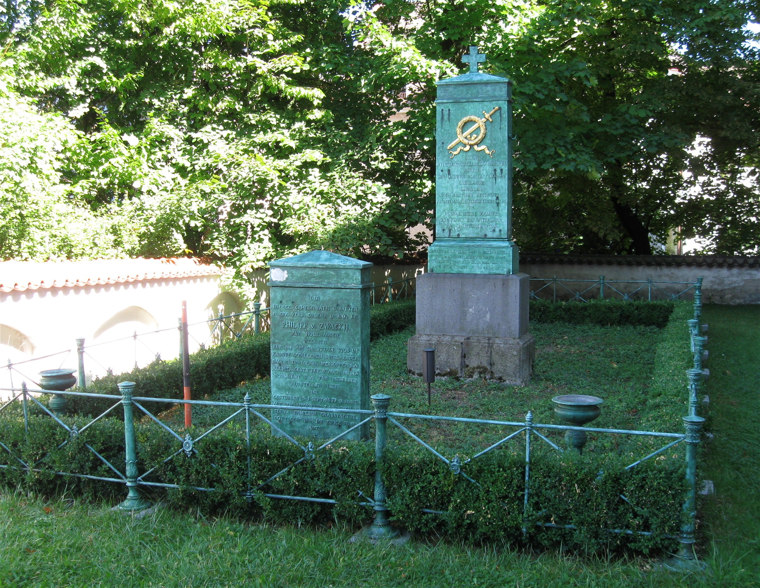 Neben der alten Sendlinger Kirche St. Margaret; das von Philipp von Zwackh gestiftete Monument für die Gefallenen der Sendlinger Mordweihnacht (hinten) mit Gedenkstein für Philipp von Zwackh (vorne)